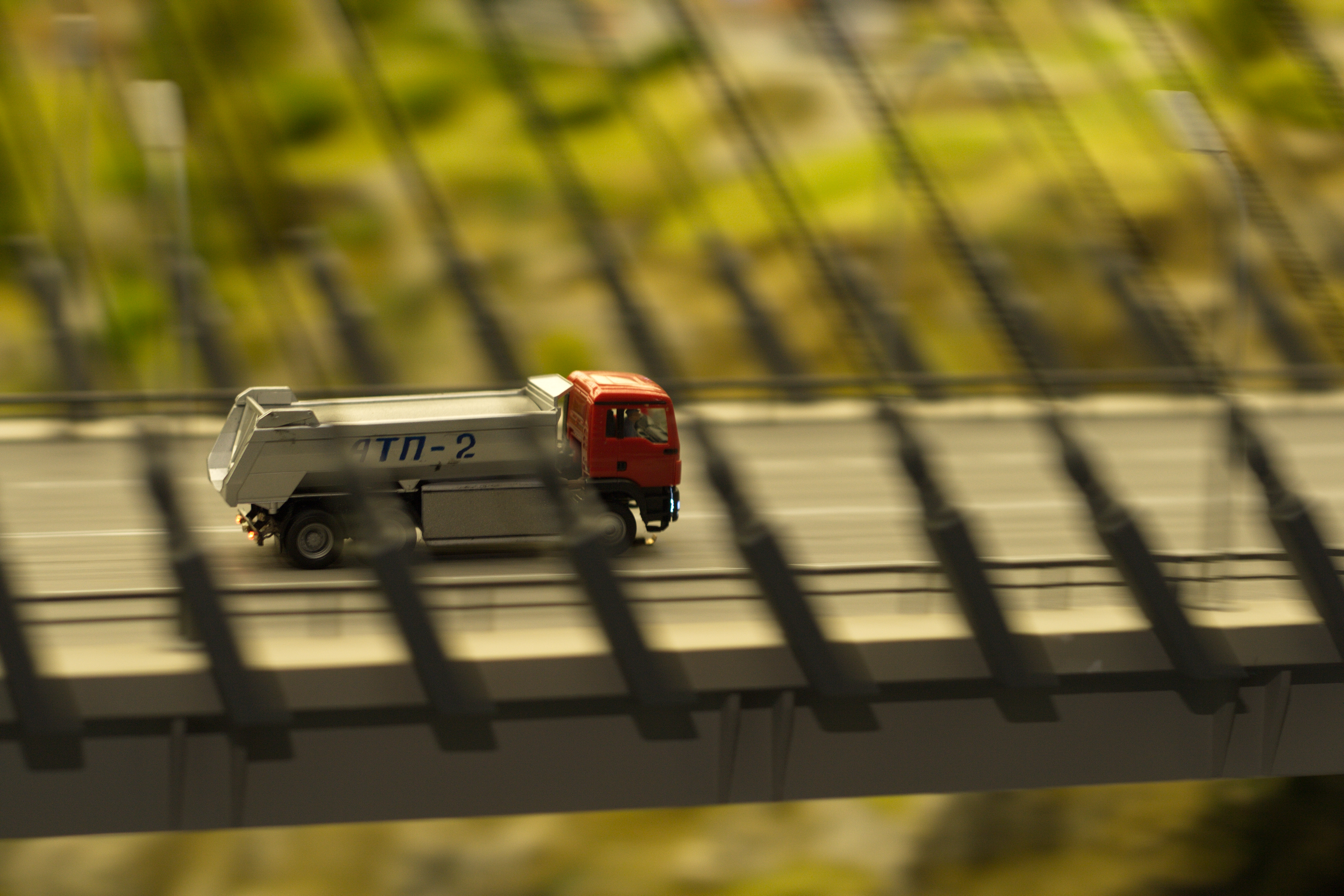 Движущиеся автомобили на макете